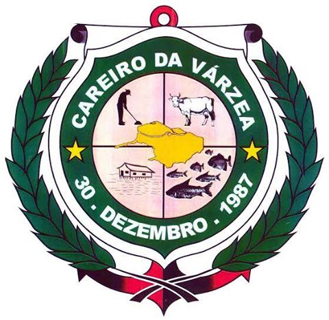 Brasão do Careiro da Várzea (Amazonas)